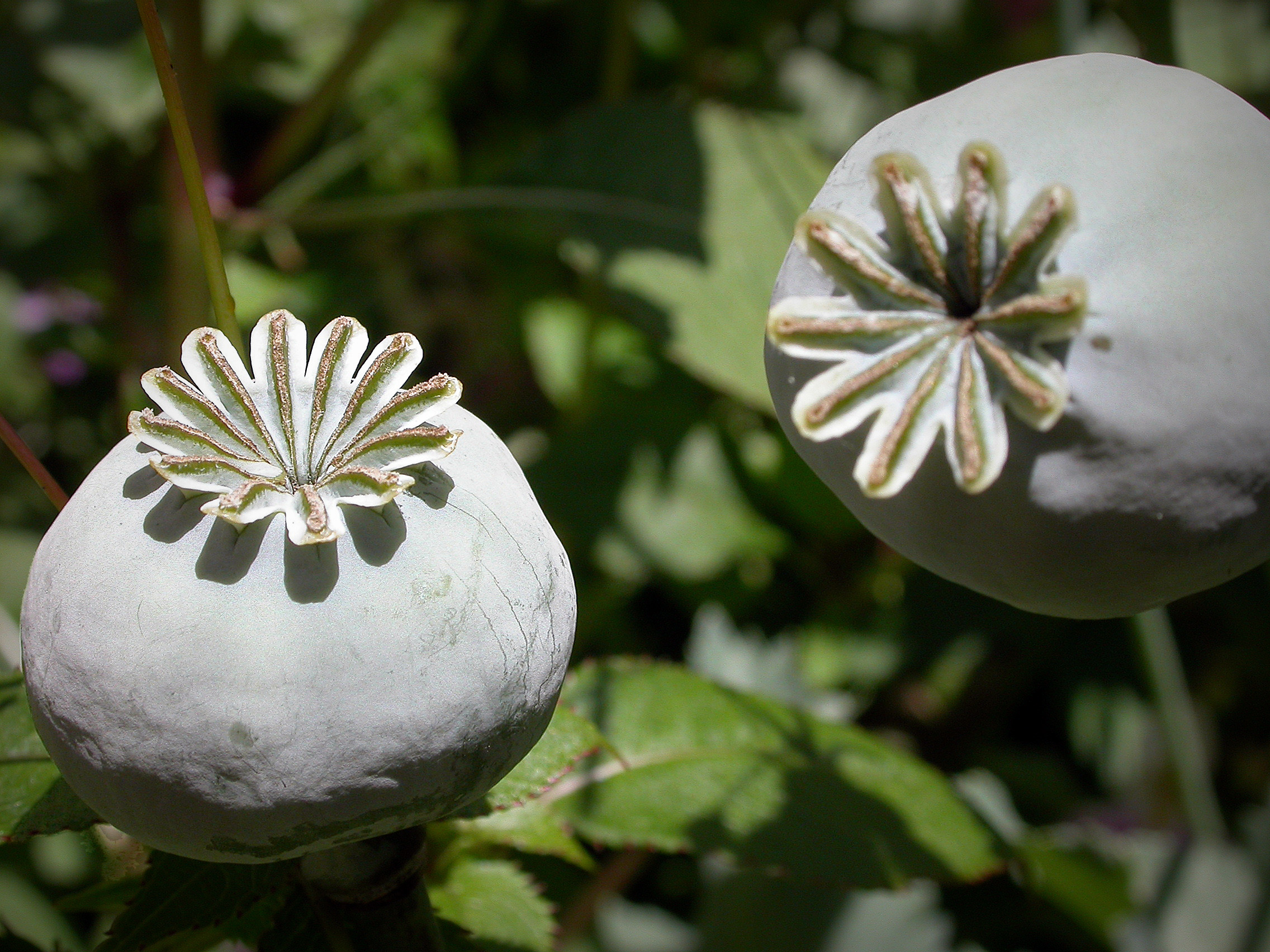 Opium poppy